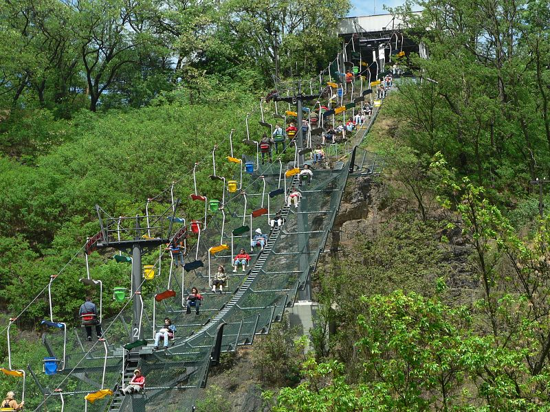 Chairlift, lanová dráha, ZOO Praha